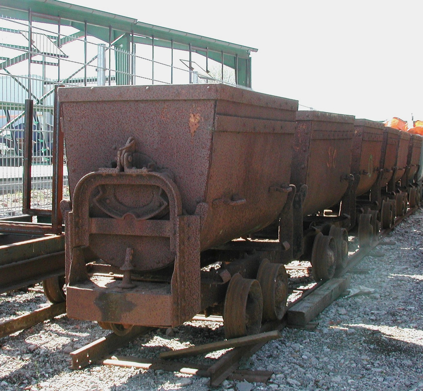 Bergbauloren sog. Grubenhunte, Spurweite 600 mm